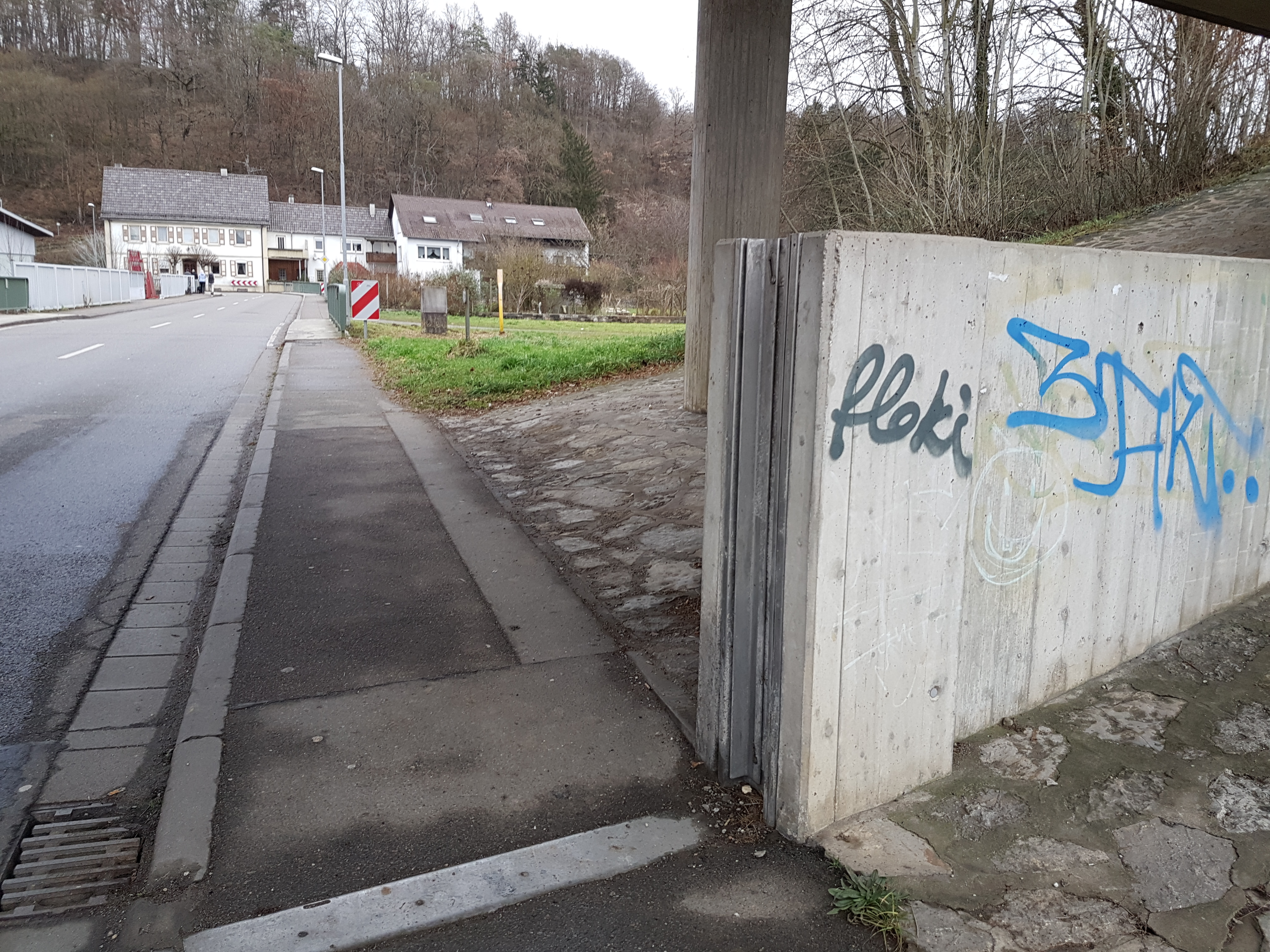 Hochwasserschutz in Eschelbronn